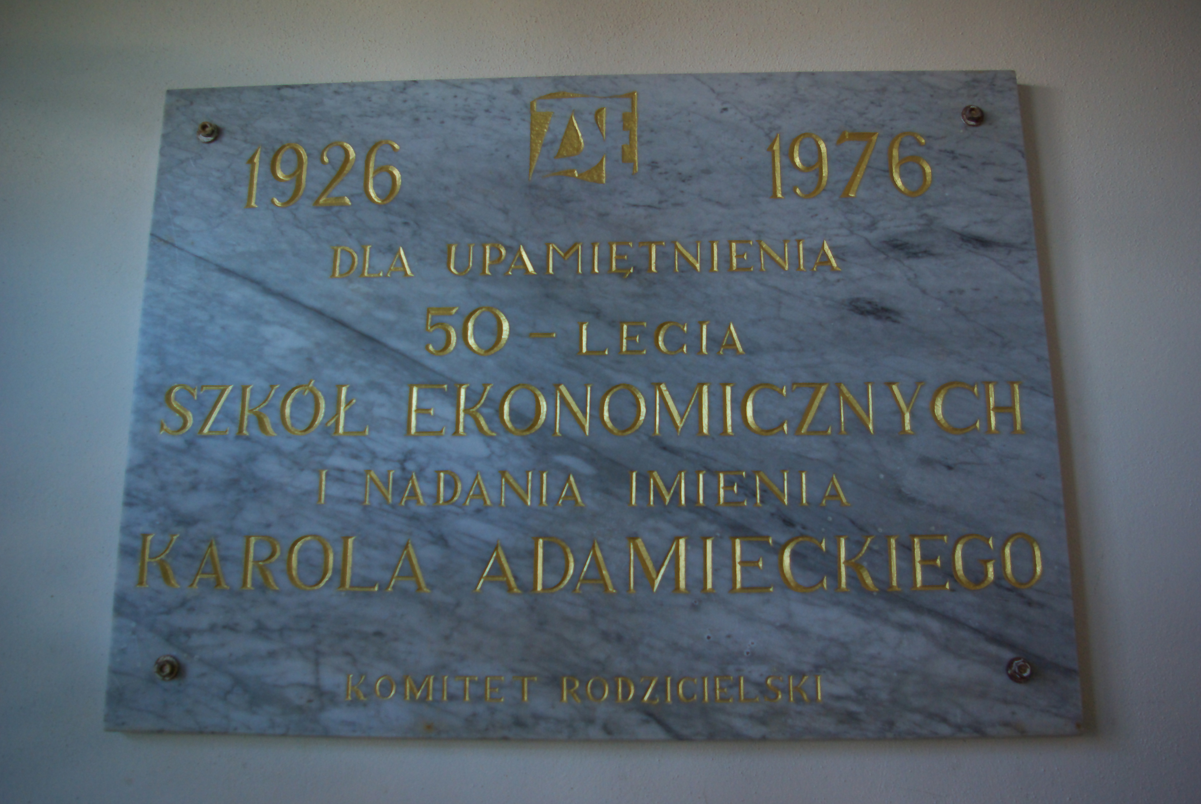 Zespół Szkół nr 1 im. Karola Adamieckiego w Sanoku. Tablica pamiątkowa